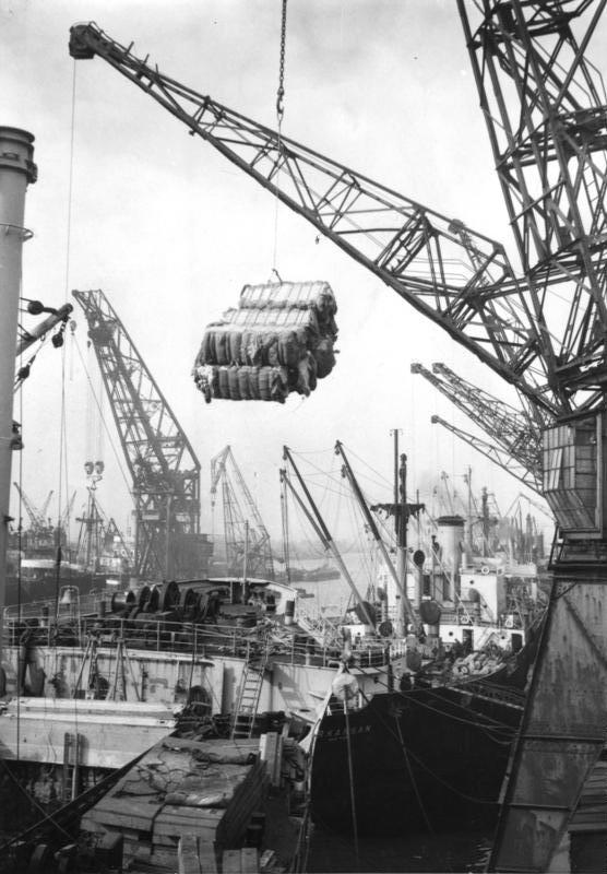 Bremen, Schiff mit Baumwolle aus USA wird gelöscht Illus-dpd Baumwolle aus dem ERP-Programm. 200 000 Ballen ERP-Baumwolle wurden bisher von der JEIA eingeführt. Unser Bild zeigt das Löschen der Baumwollballen, die an Bord des amerikanischen Frachters P6T.Seafarer" der United States Marine Corporation aus Delaware in Bremen eintrafen. 21-3-49 2980-49